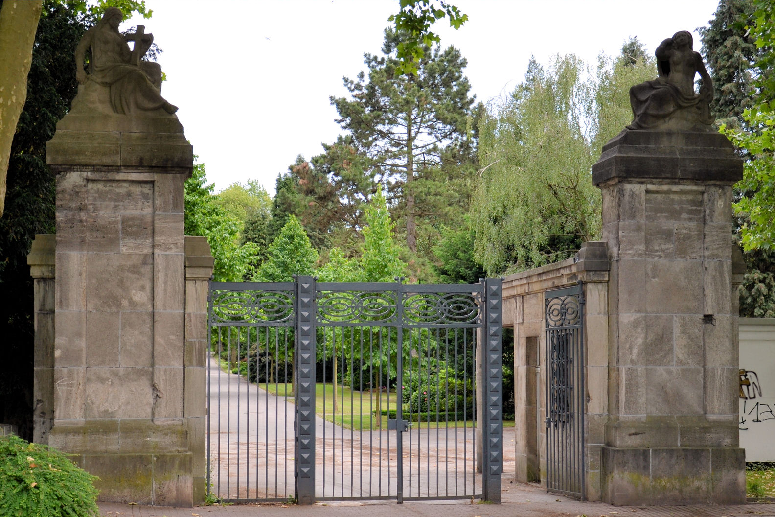 Hauptportal des Essener Ostfriedhofs, nach einem Entwurf des Essener Architekten Edmund Körner, leicht verändert